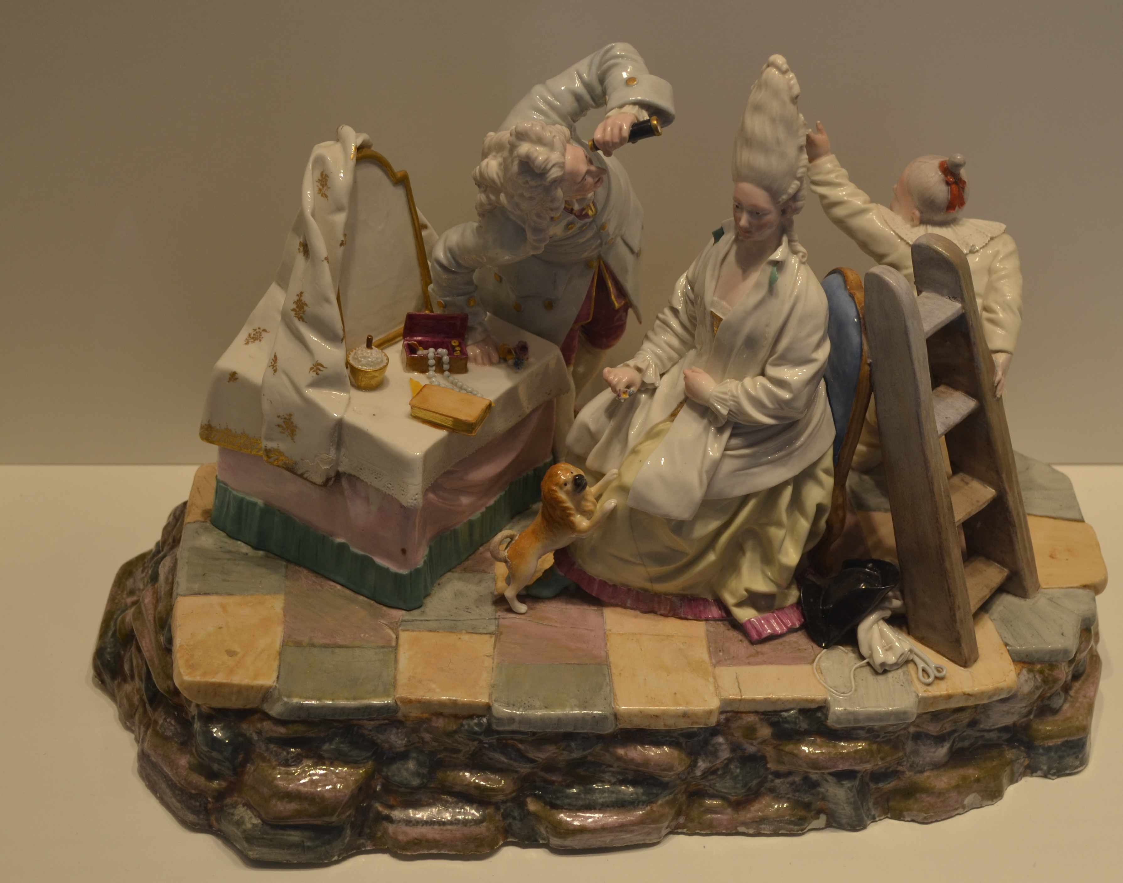 Hohenberg an der Eger (Bayern-Deutschland) - Porzellanikon - Die hohe Frisur - Entwurf: nach Carl Ries fûr Höchst, um 1785 Wohl Thüringen, Anfang 20. Jahrhundert - Aufglasur- und Goldbernalung - Porzellanikon Inv. Nr. 8723/94.